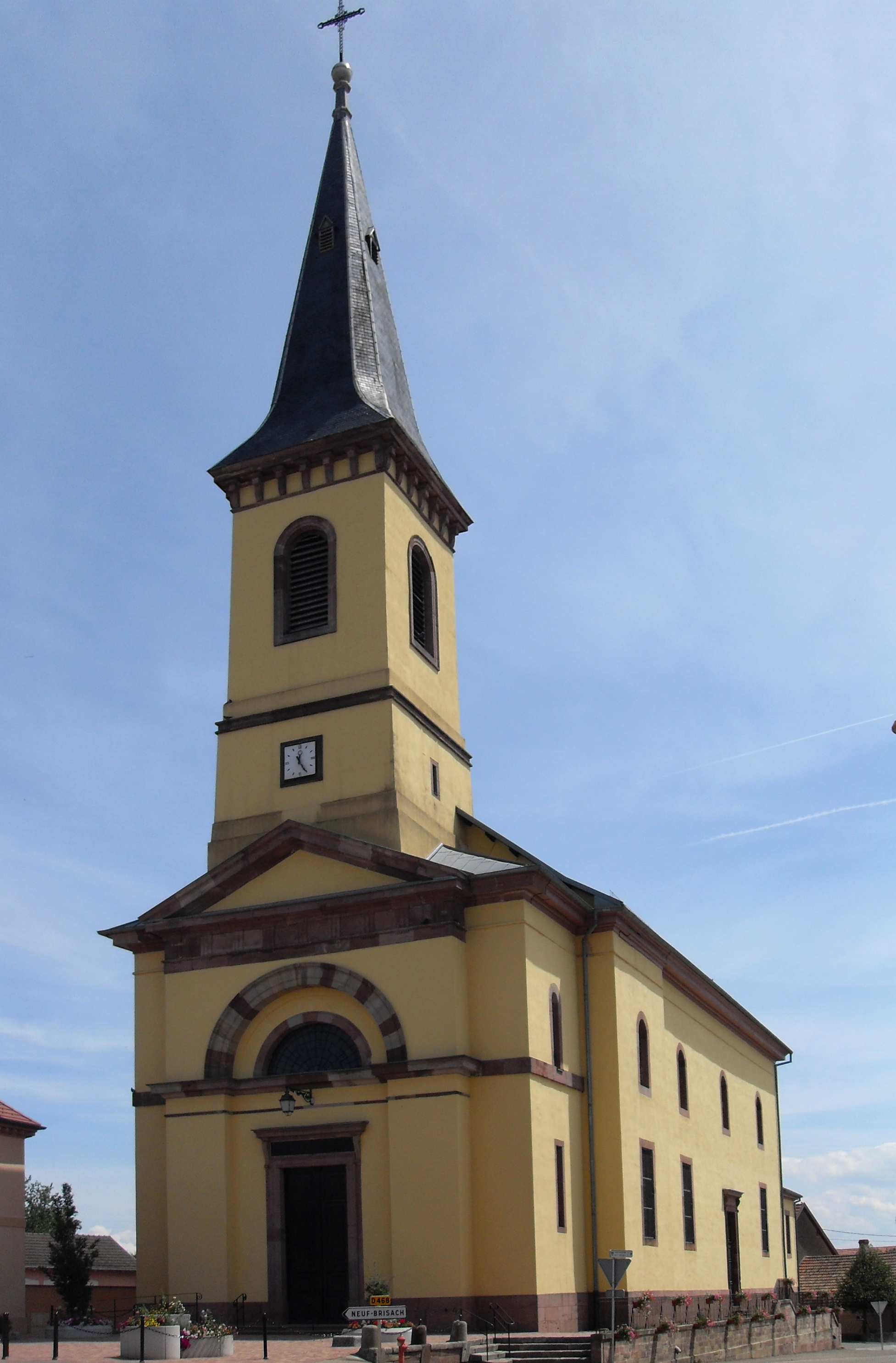 L'église Saint-Jacques-le-Majeur à Heiteren